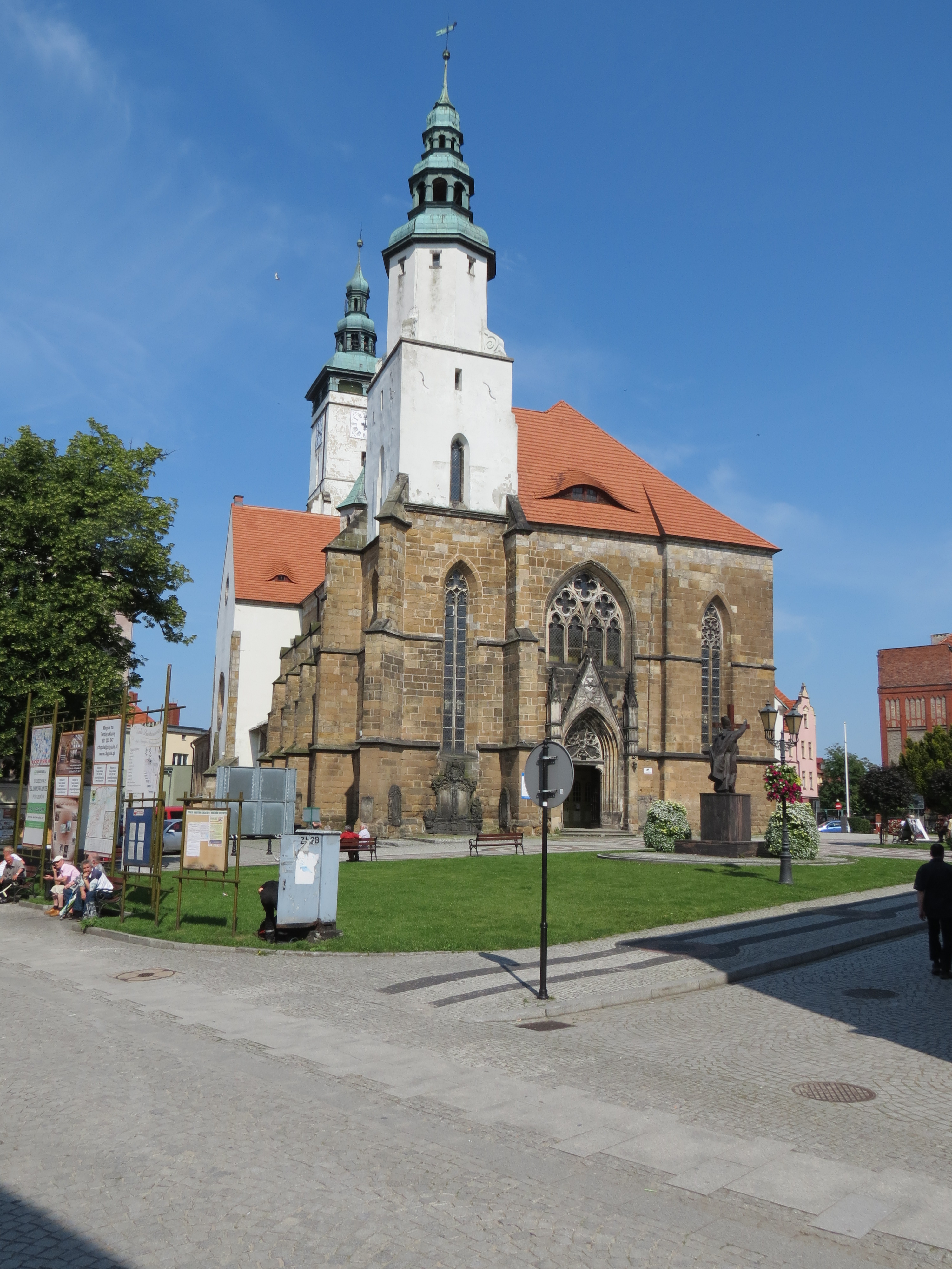 Złotoryja, kościół pomocniczy p.w. Narodzenia NMP, 1230, XVI, XX